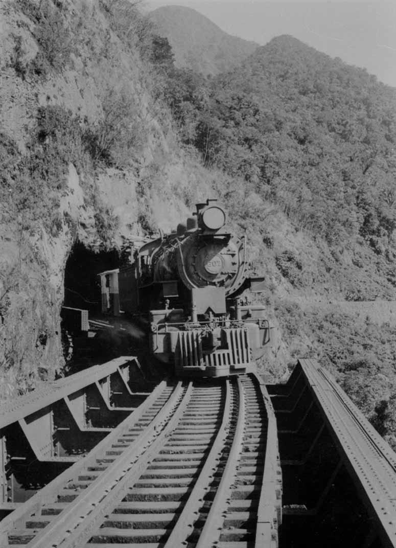 Locomotiva a Vapor da RVPSC #302, sob o Viaduto Carvalho.